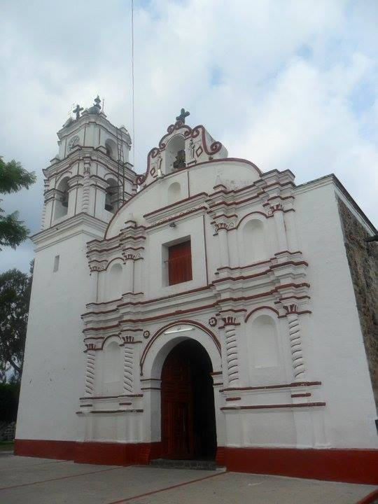 Iglesia de Nuestra Señora de La Asunción en Tlacotepec, Morelos, México.